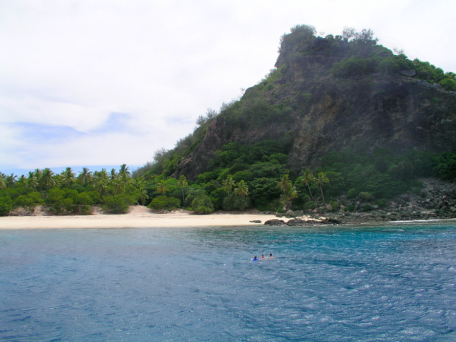 Insel Mondriki, Fidschi